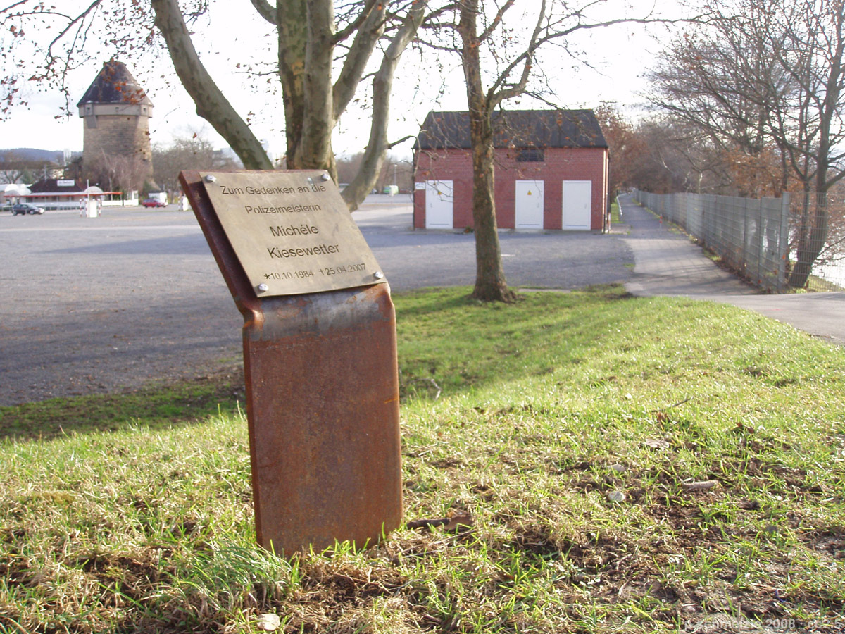 Gedenktafel bei der Theresienwiese in Heilbronn für die Polizistin Michèle Kiesewetter, die im April 2007 einem Gewaltverbrechen zum Opfer fiel. Im Hintergrund das Festgelände Theresienwiese. Der Tatort war vor dem Gebäude rechts im Hintergrund. Links im Hintergrund der General-Wever-Turm.